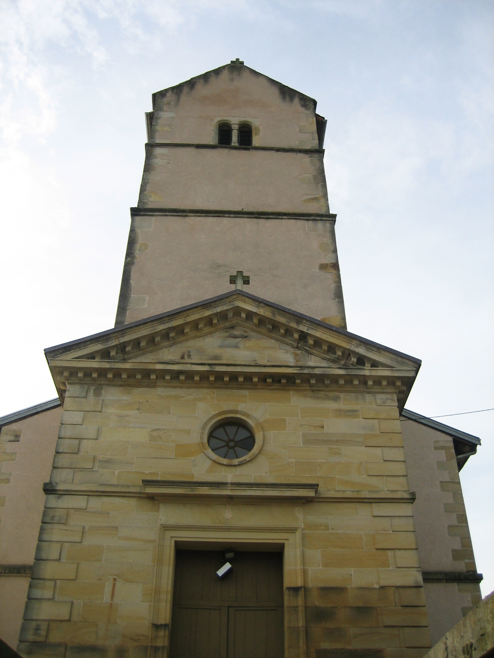 Clocher de l'église de Dompierre (Vosges] par Raphaël Tassin le 31 octobre 2006